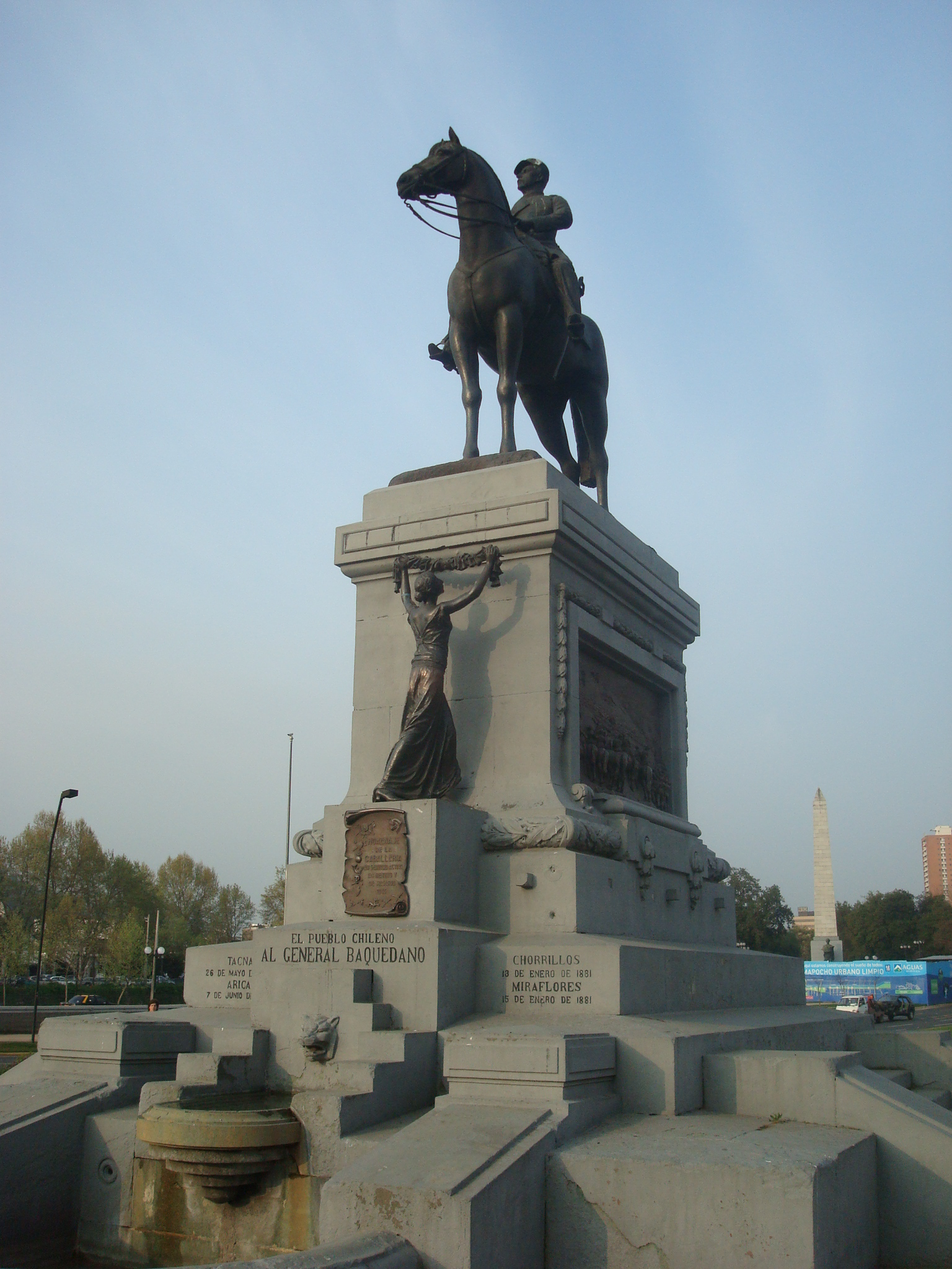 Monumento al Gerenal Baquedano, Plaza Baquedano, Santiago, Chile